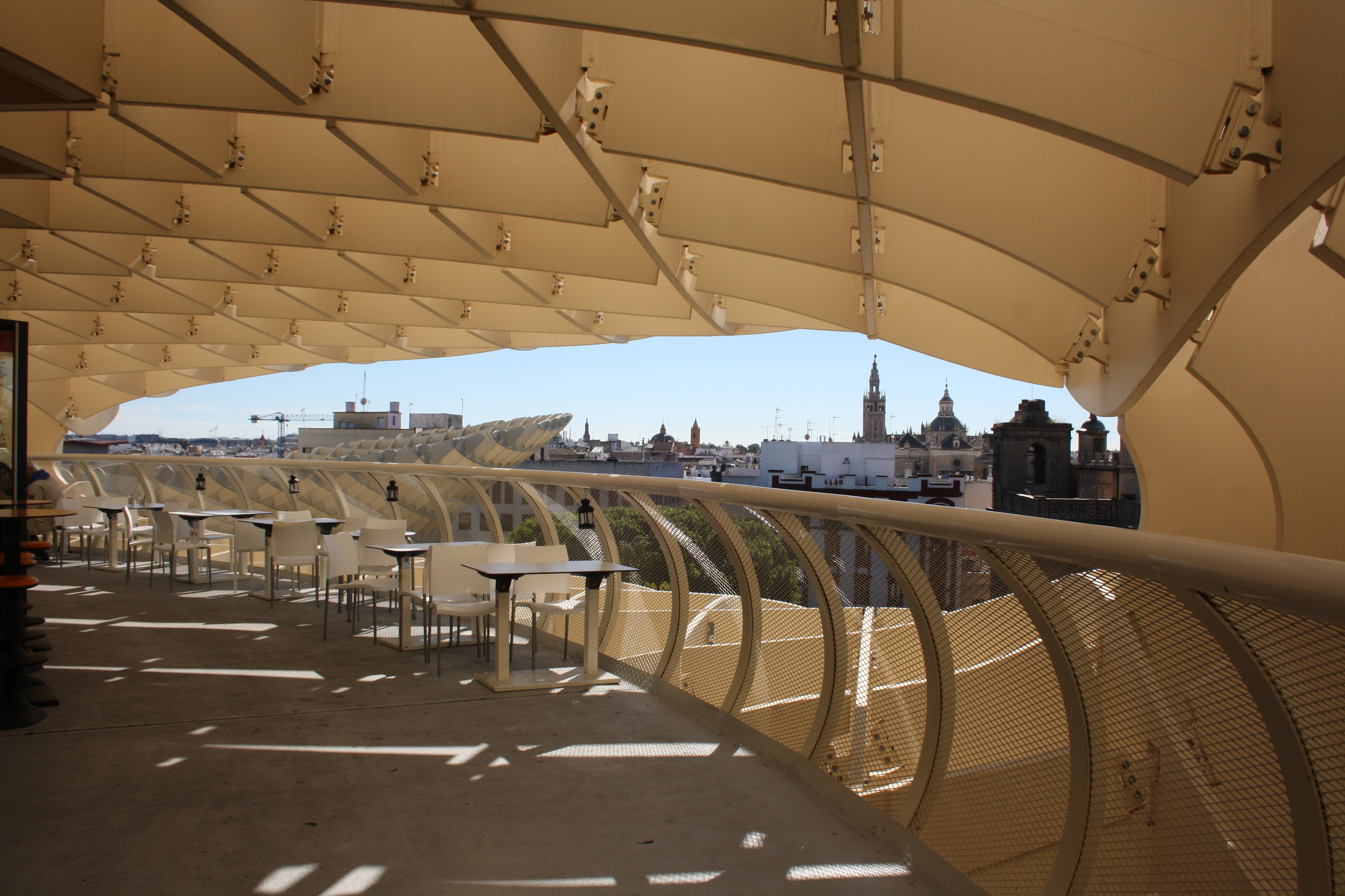 Bauwerk in Sevilla des Architekten Jürgen Mayer H. Blick auf die Kathedrale von Sevilla mit der Giralda